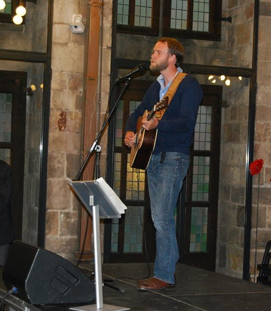 Wannes Cappelle brengt het lied 'Ploegsteert' tijdens de voorstelling van het jaarboek 'Etappe' van het Wielermuseum Roeselare in het museum 'In Flanders Fields' te Ieper, 8 juli 2014.